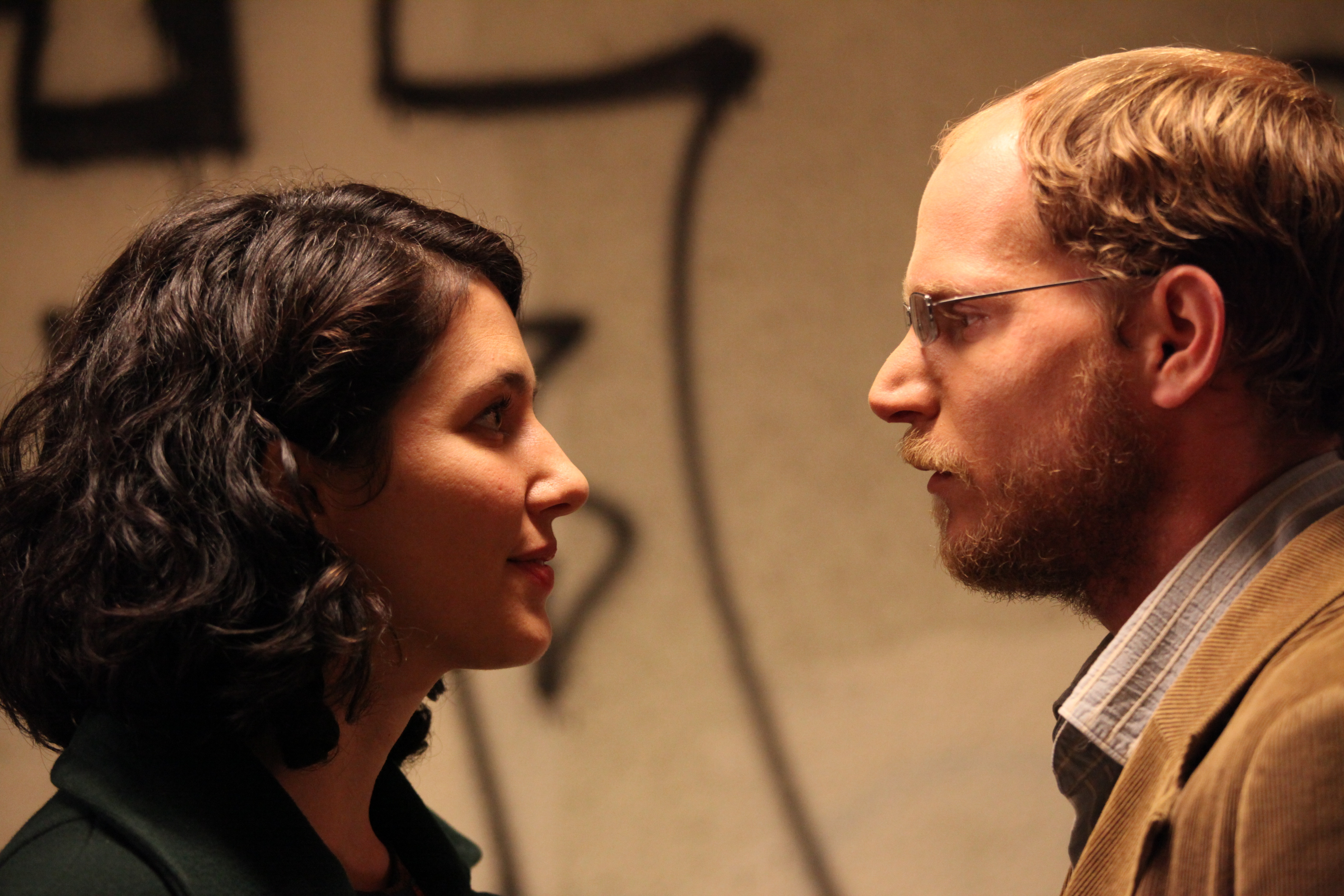 רותם קינן ושרון טל בסרטו של ערן קולירין ההתחלפות